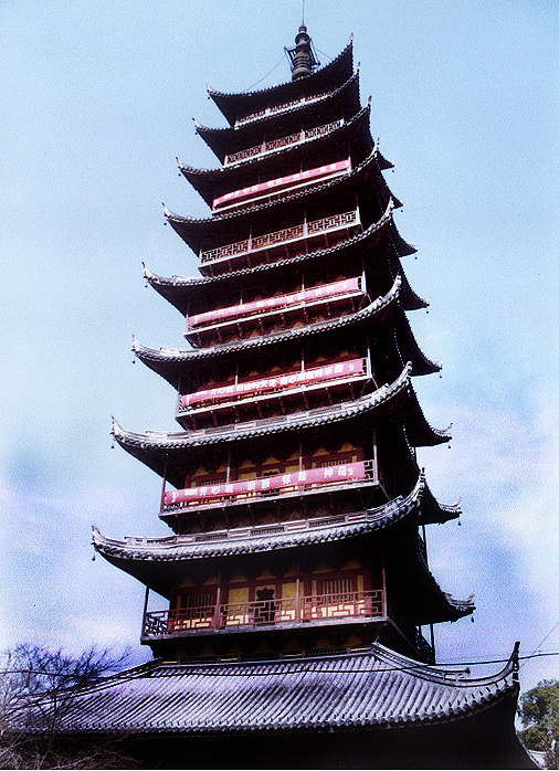 更多haier7917的中国古建照片：